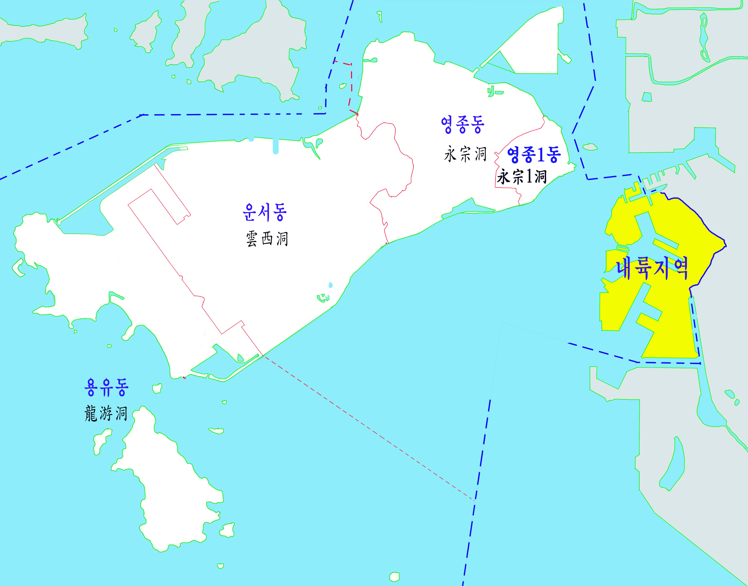 인천중구 행정구역도(도서지역)